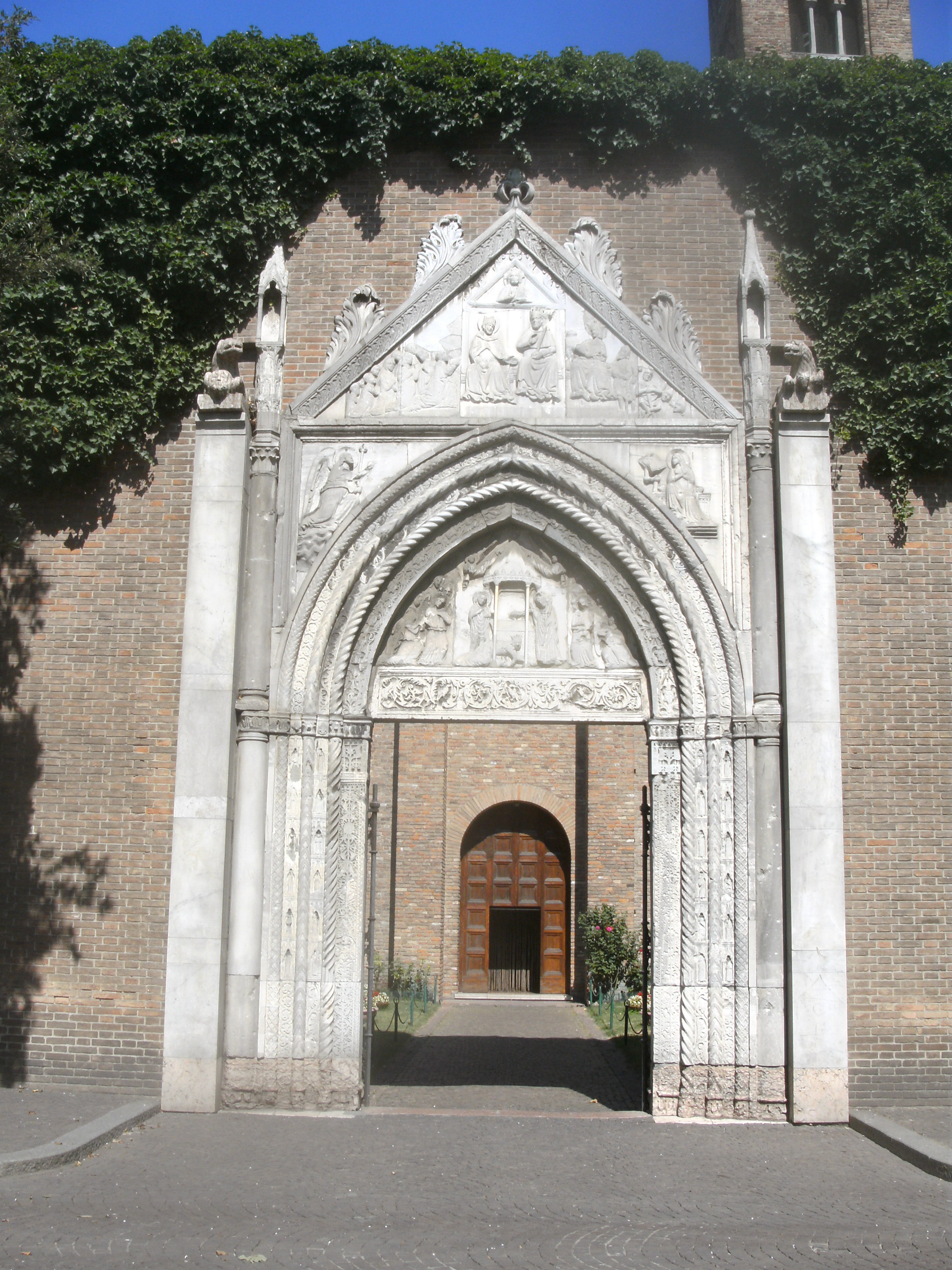 Portal des Vorhofs der Kirche S. Giovanni Evangelista in Ravenna, Norditalien.